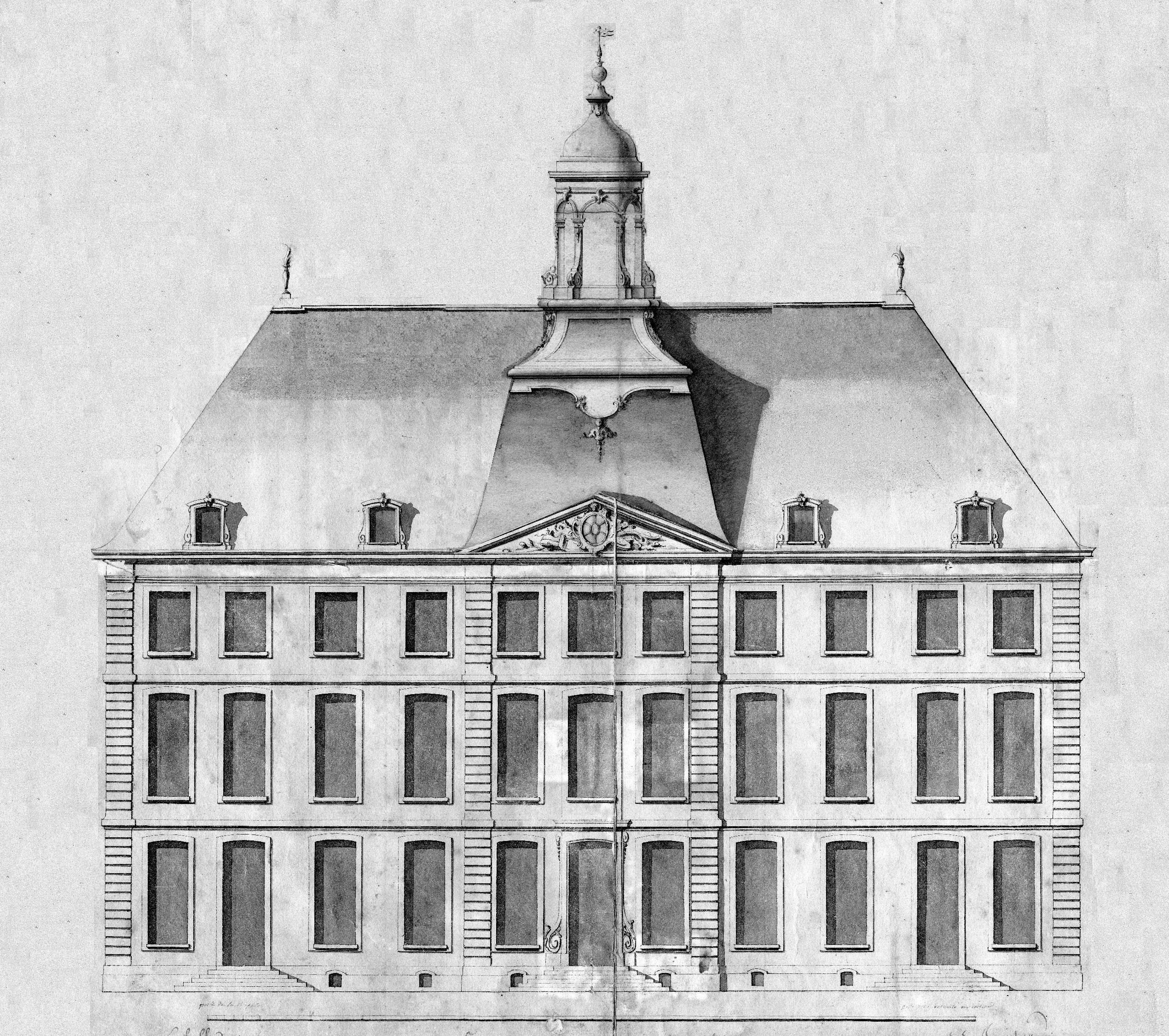 Le château de Noslon avec son observatoire envisagé mais non réalisé : photo-montage.